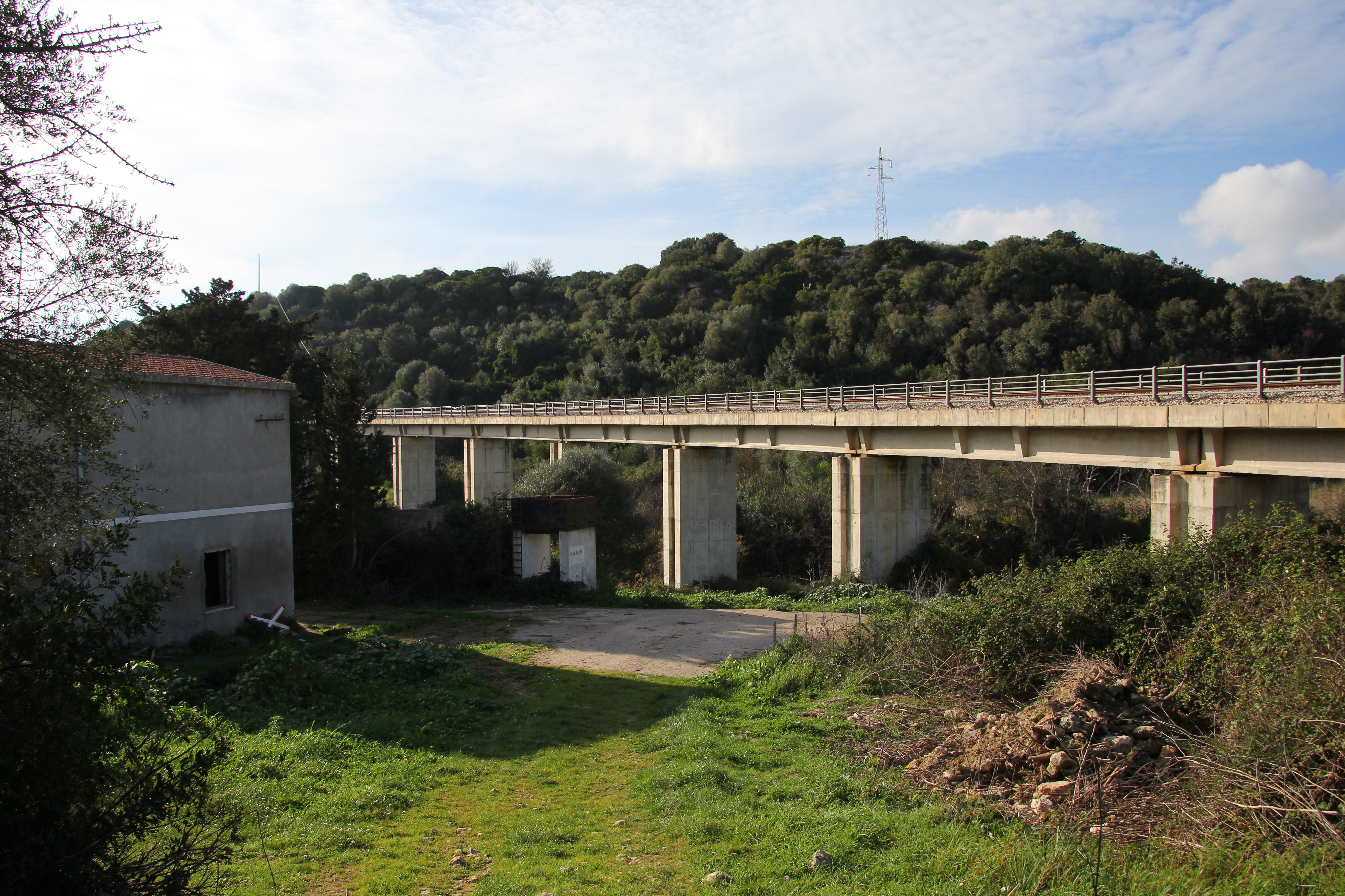 Usini - Ex stazione ferroviaria di San Giorgio